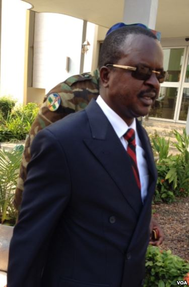 Alexandre Ferdinand Nguendet President du Conseil National de Transition après la rencotre avec Samantha Power. Travail du VOA, tel que le confirme la notice "VOA" en bas à droite.